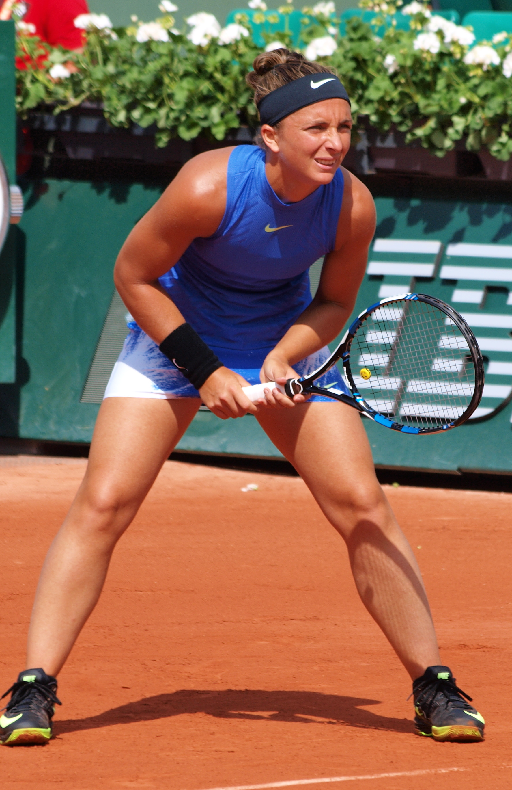 Sara Errani aux Internationaux de tennis de Roland Garros, le 31 mai 2017, dans son match contre Kristina Mladenovic.